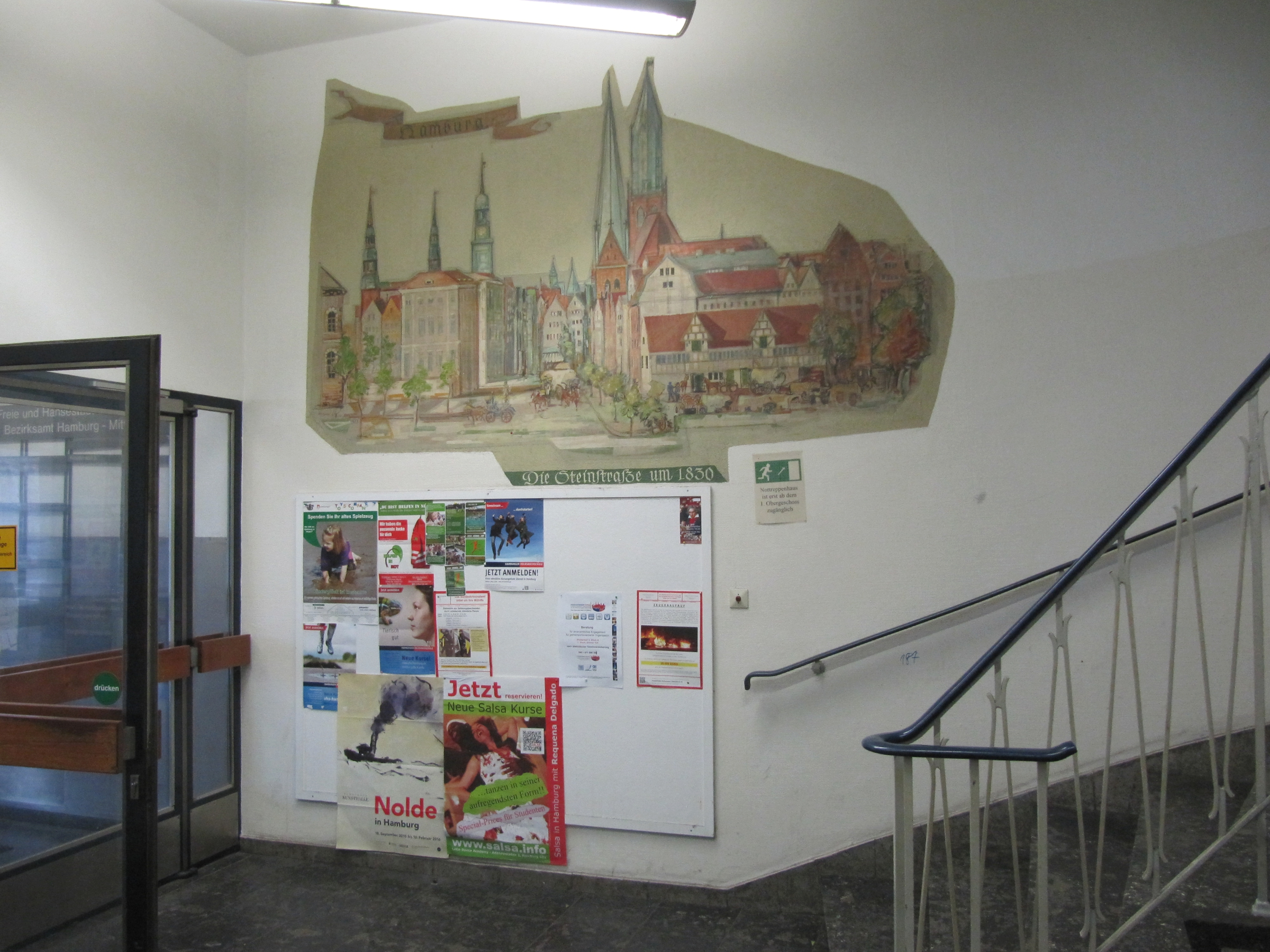 Wandmalereien des Künstlers "Reimer" (1956/1957) in den Foyers der City-Hof-Hochhäusern A, B und C, Klosterwall, Hamburg (15. Dezember 2015).